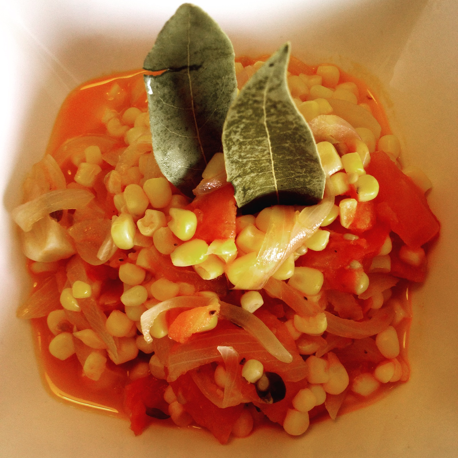 Plato típico chileno preparado a base de tomate y choclo (maíz). Decorado con hojas de laurel